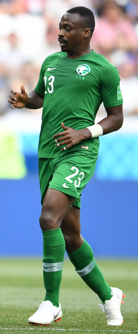 Египет с Салахом проиграл Саудовской Аравии